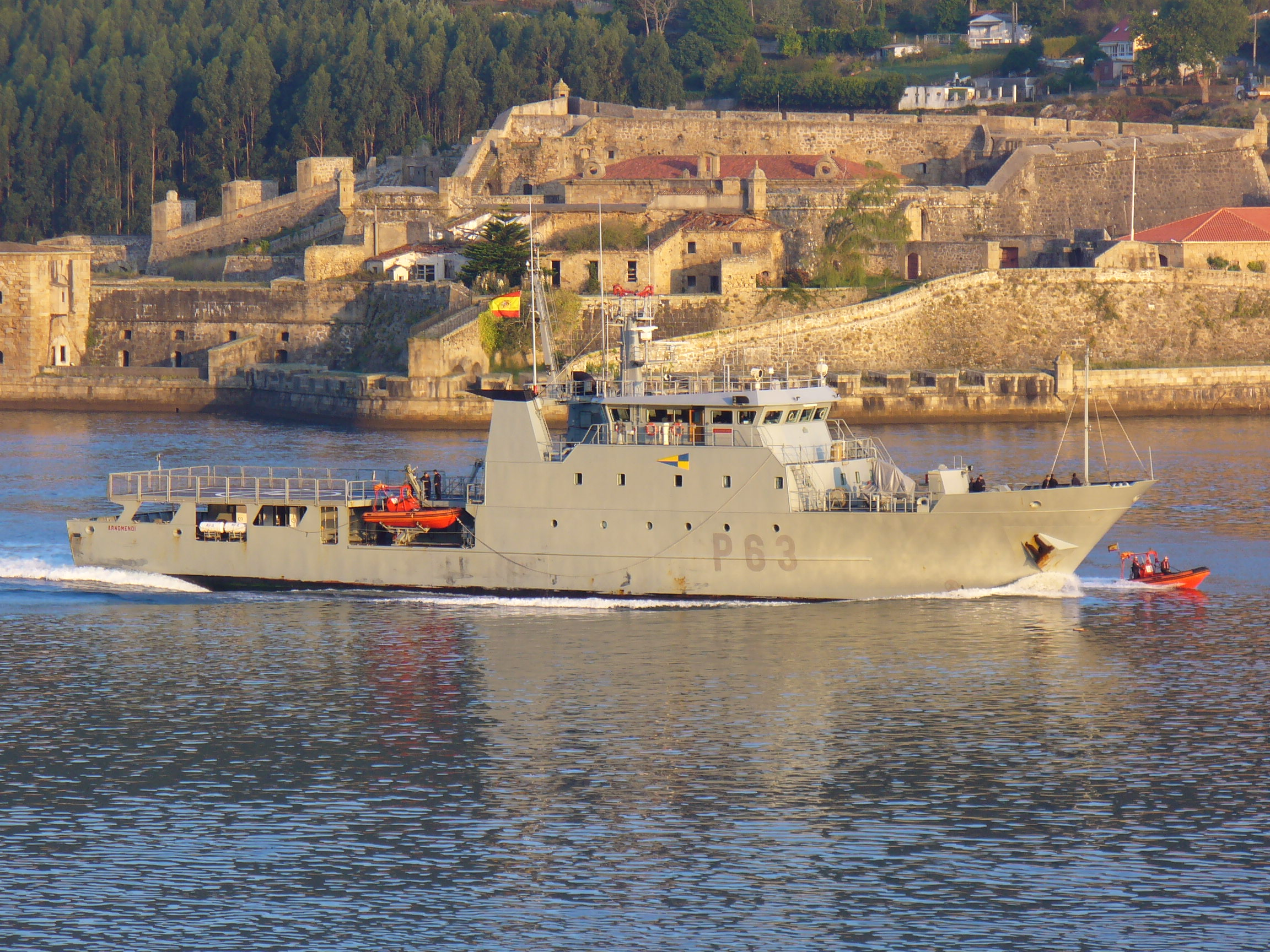 País: España Clase, [Tipo]: Freire 311, [PS]. Constructor: Construcciones Navales P. Freire, S.A., Vigo, España. Fecha botadura: 6 de enero de 2000. Fecha alta: 13 de diciembre de 2000. Desplazamiento ( toneladas ): 1.414 a plena carga. Dimensiones ( metros ): 66,5 x 11 x 4,4 Velocidad ( nudos ): 17. Autonomía ( millas ): 22.000 a 16 nudos. Dotación: 44: 30 tripulación + 4 inspectores de pesca + 2 personal médico + 8 personal de transporte. Cañones: 2 x Browning 12,7mm. Helicóptero: Posee una plataforma en la popa en la que puede operar un helicoptero ligero. Indicativo: EBBT Comentario: Inicialmente se iba a llamar "Alegranza", pero finalmente adoptó el nombre de "Arnomendi", monte vasco situado en la franja costera de la provincia de Guipúzcoa. Base: Las Palmas.